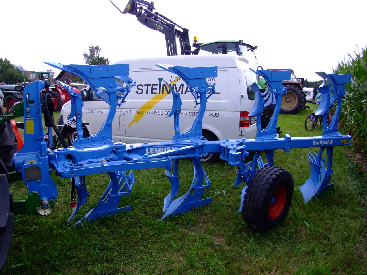 Lemken-Vierscharpflug EurOpal 5, 3/1 N 100, Baujahr 2006